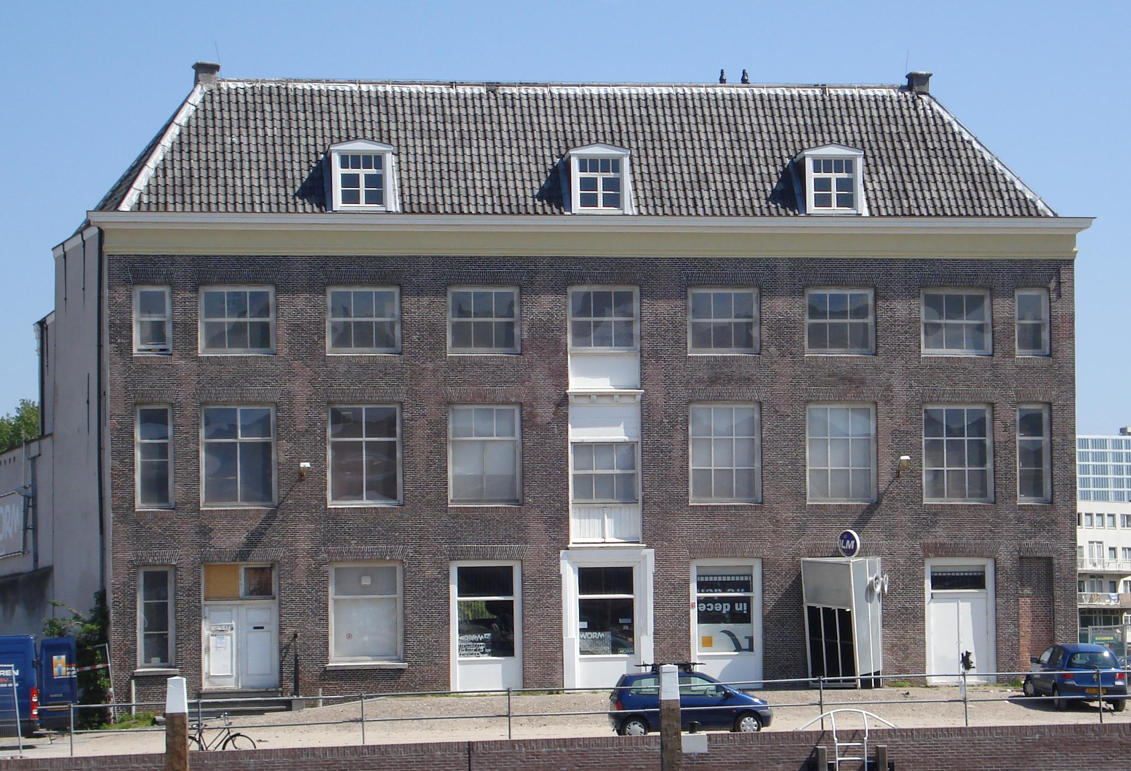 Rotterdam Delfshaven, Achterhaven 148. Rijksmonument.